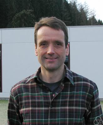 Foto di Rupert Klein